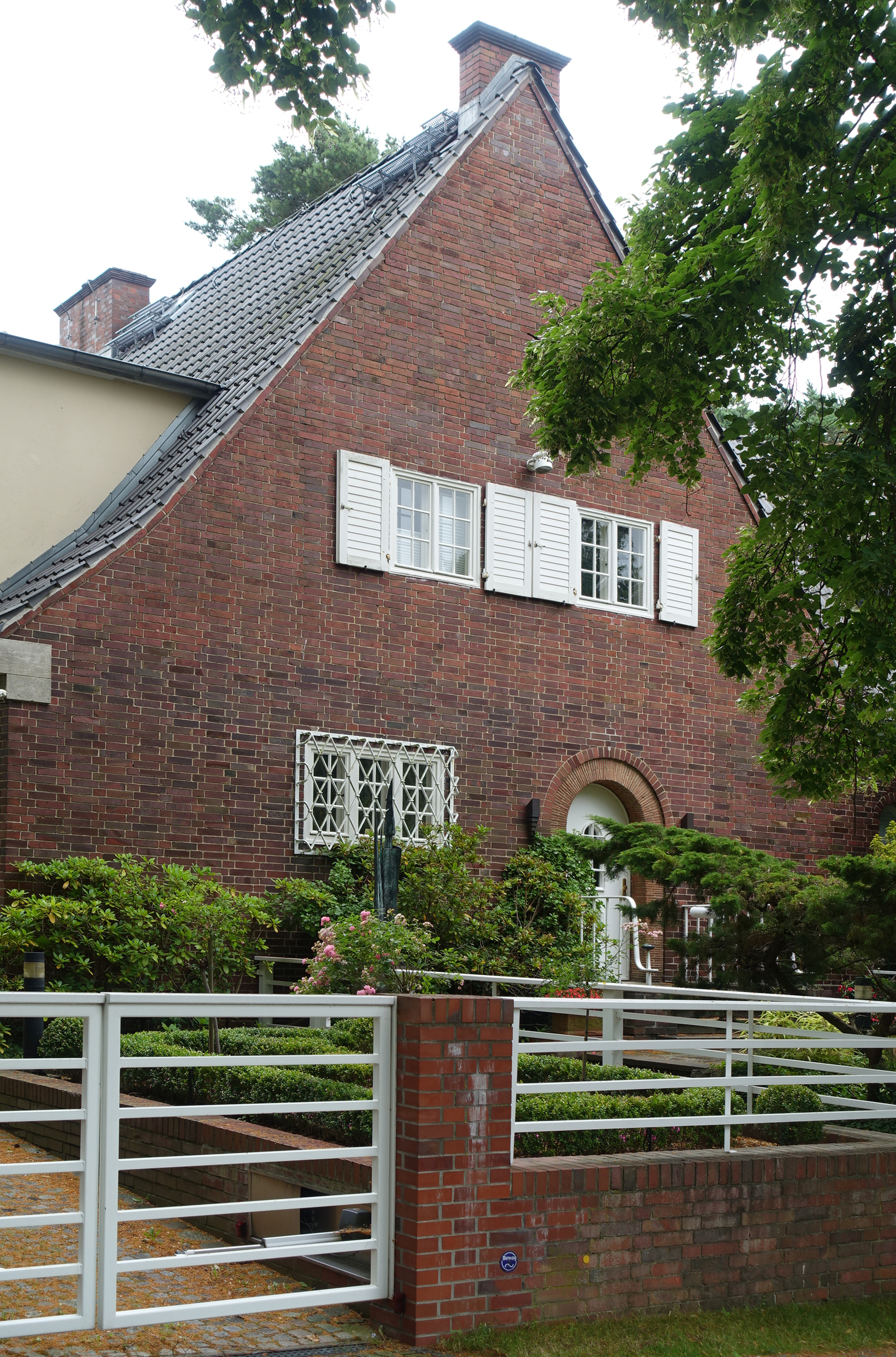 Wohnhaus